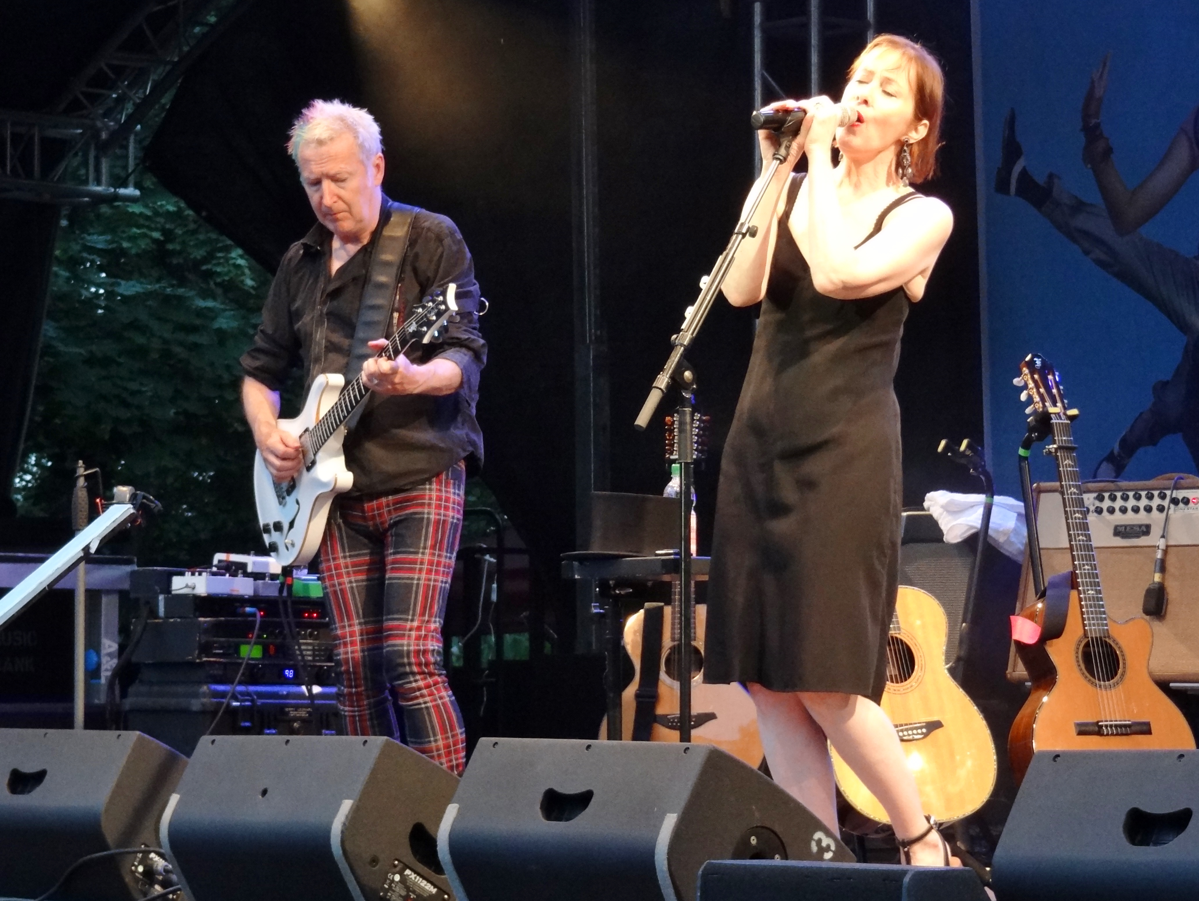 Suzanne Vega mit Gerry Leonard beim 13. Inselleuchten-Festival in Marienwerder, Land Brandenburg, Deutschland